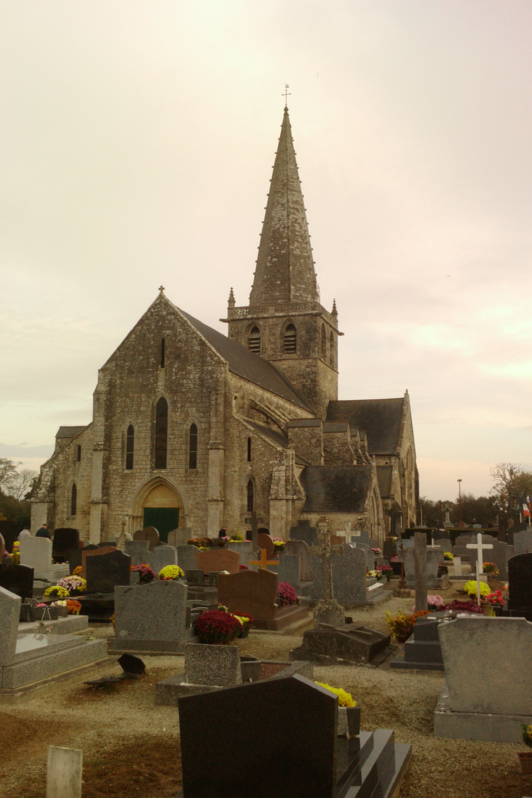 Église Saint-Candide de Picauville (13e ; 15e ; 17e)